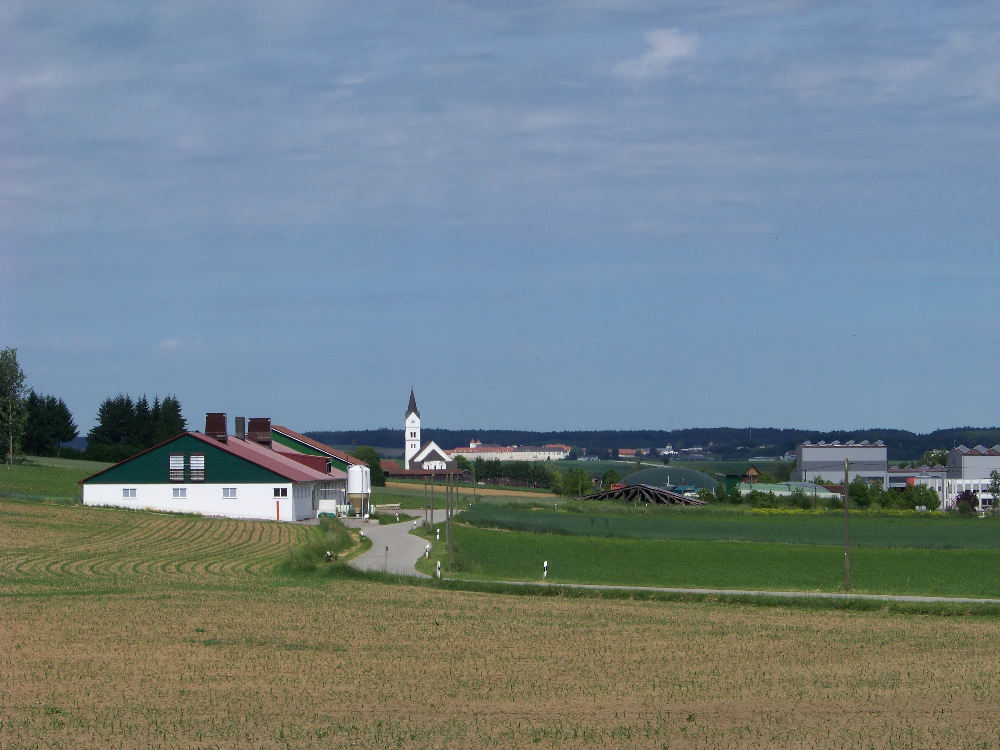 Laberweinting-Hofkirchen. Blick vom Waldrand am Poschenhof über Hofkirchen zum Kloster Mallersdorf. In den letzten Jahren entstanden hier ein Schweinemastbetrieb, eine Biogasanlage und eine Freiflächen Photovoltaikanlage. Die Anfänge des Betonfertigteilwerks bestehen schon seit den 1980er Jahren.